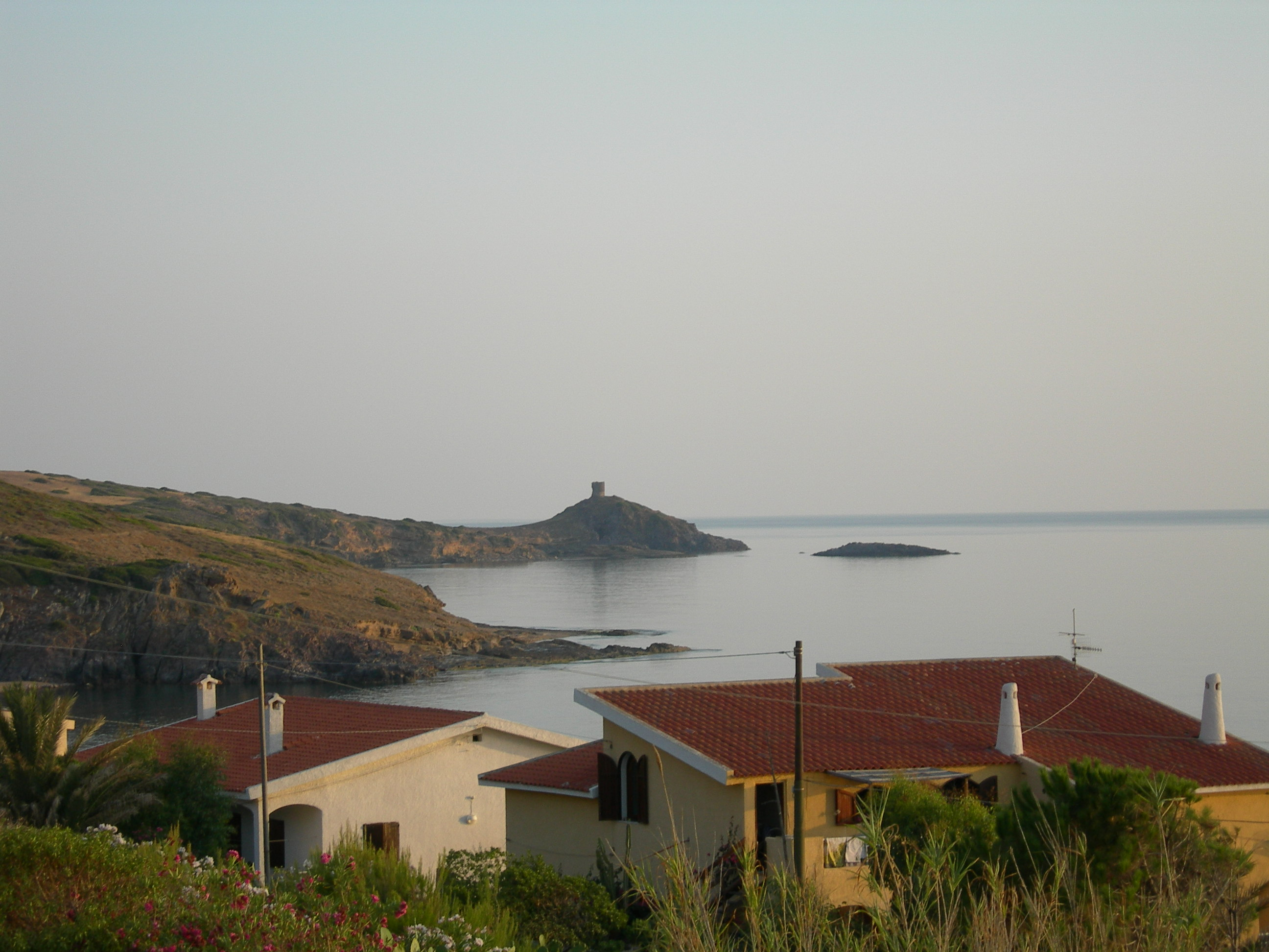 Torre di Columbargia a Porto Alabe (nel comune di Tresnuraghes, provincia di Oristano)